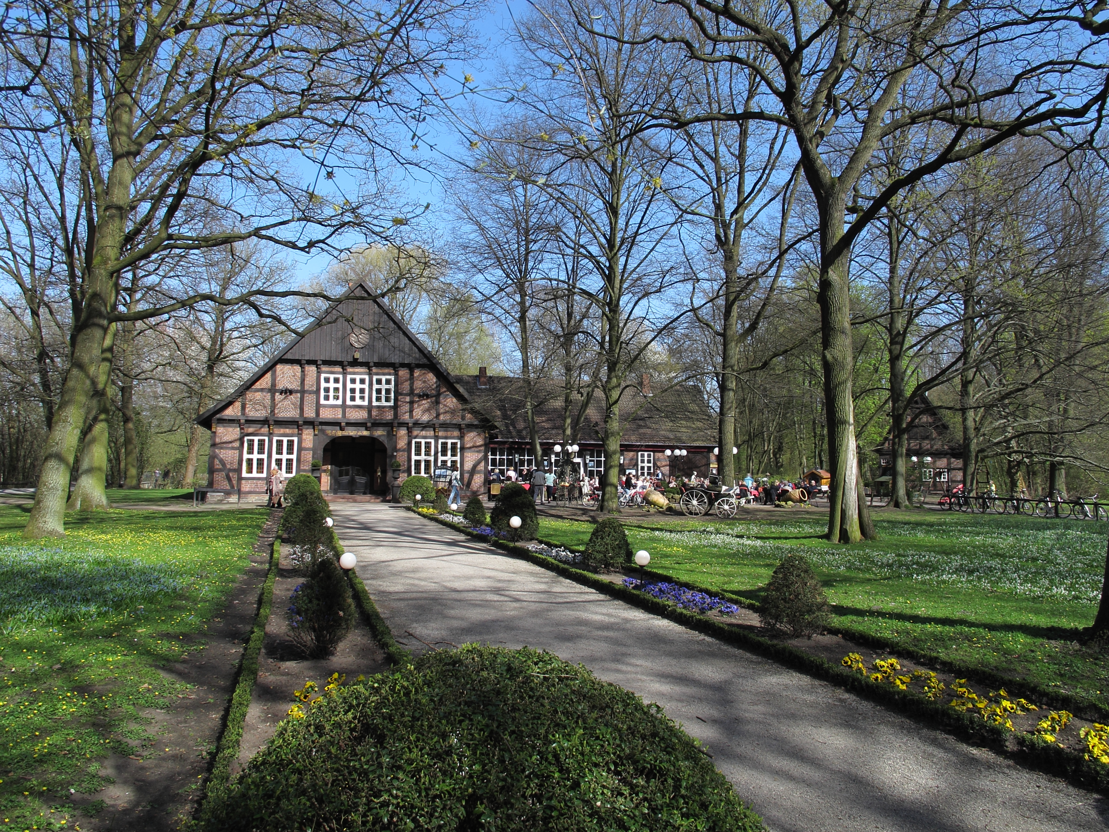 Herrmann-Löns-Park in Hannover: Restaurant „Alte Mühle“